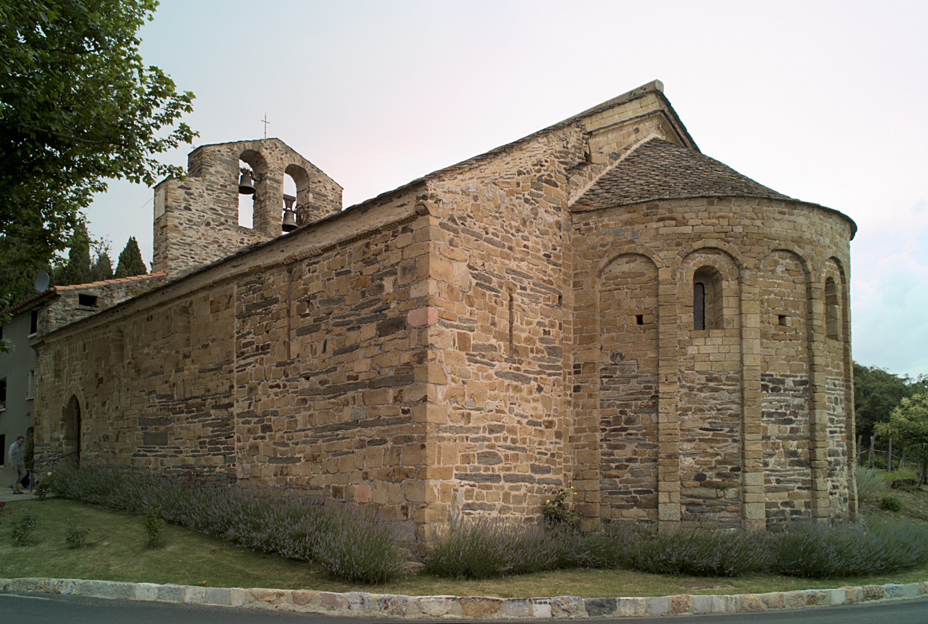 Chapelle de la Trinité, Prunet-et-Belpuig (Pyrénées-Orientales, Languedoc-Roussillon, France)